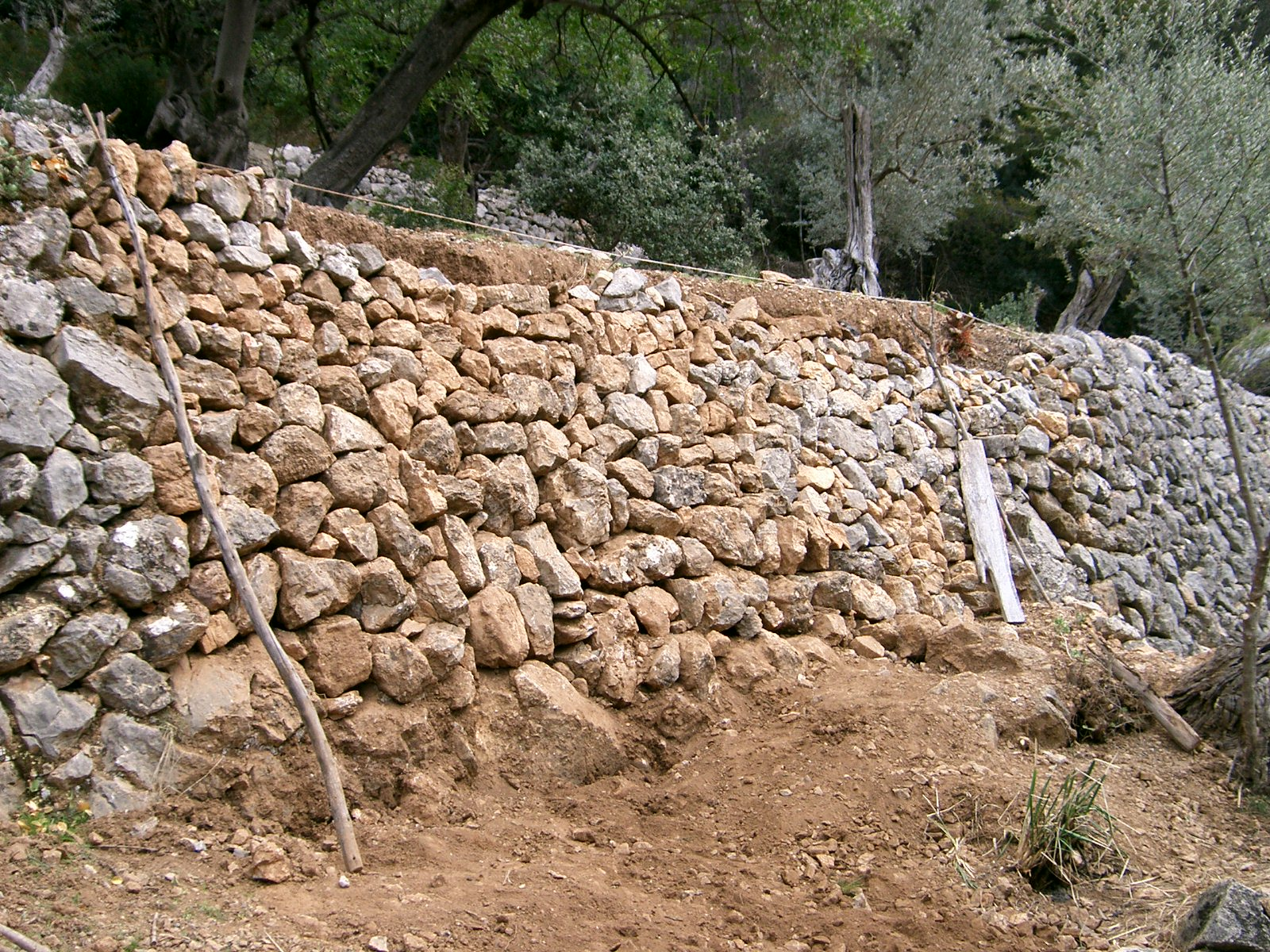 Marge en reconstrucció a Ca's Deco.